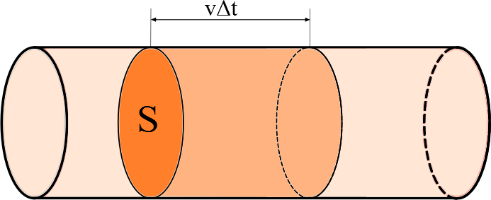 Znázornění objemového průtoku v trubici o stálém průměru.